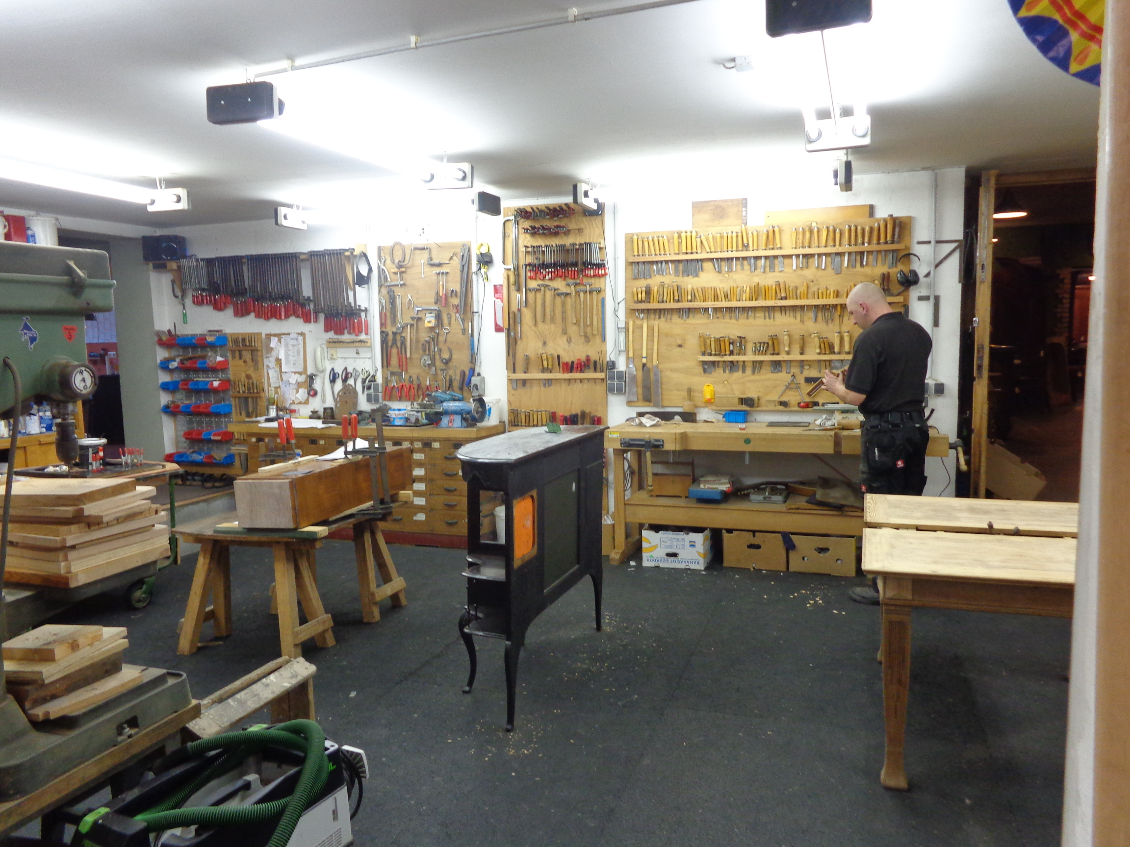 Werkstatt einer Tischlerei in Plau am See